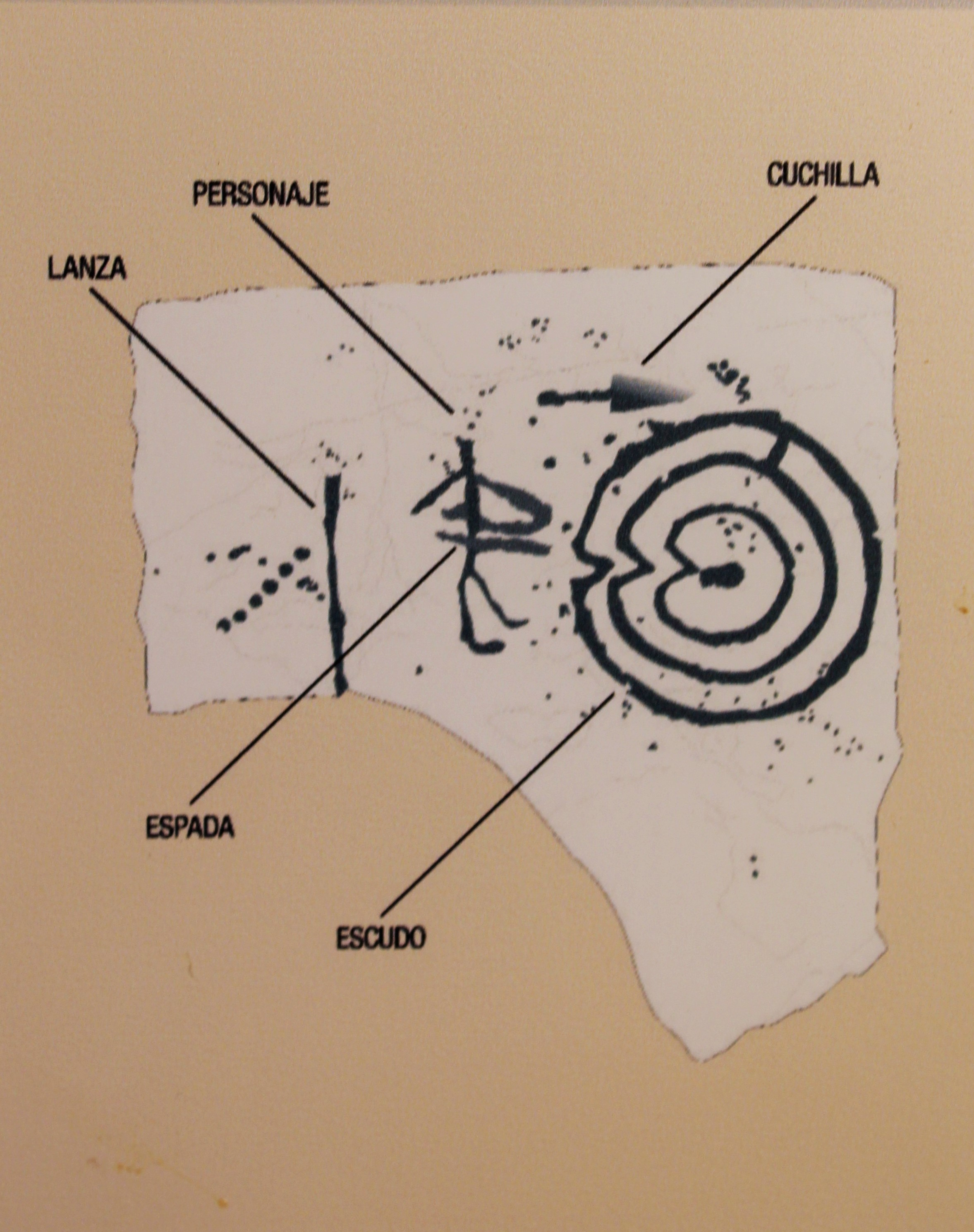 Estela de guerrero. Siglo VII-VI a.C. Dehesa Benquerencia. Benquerencia de la Serena. Badajoz.